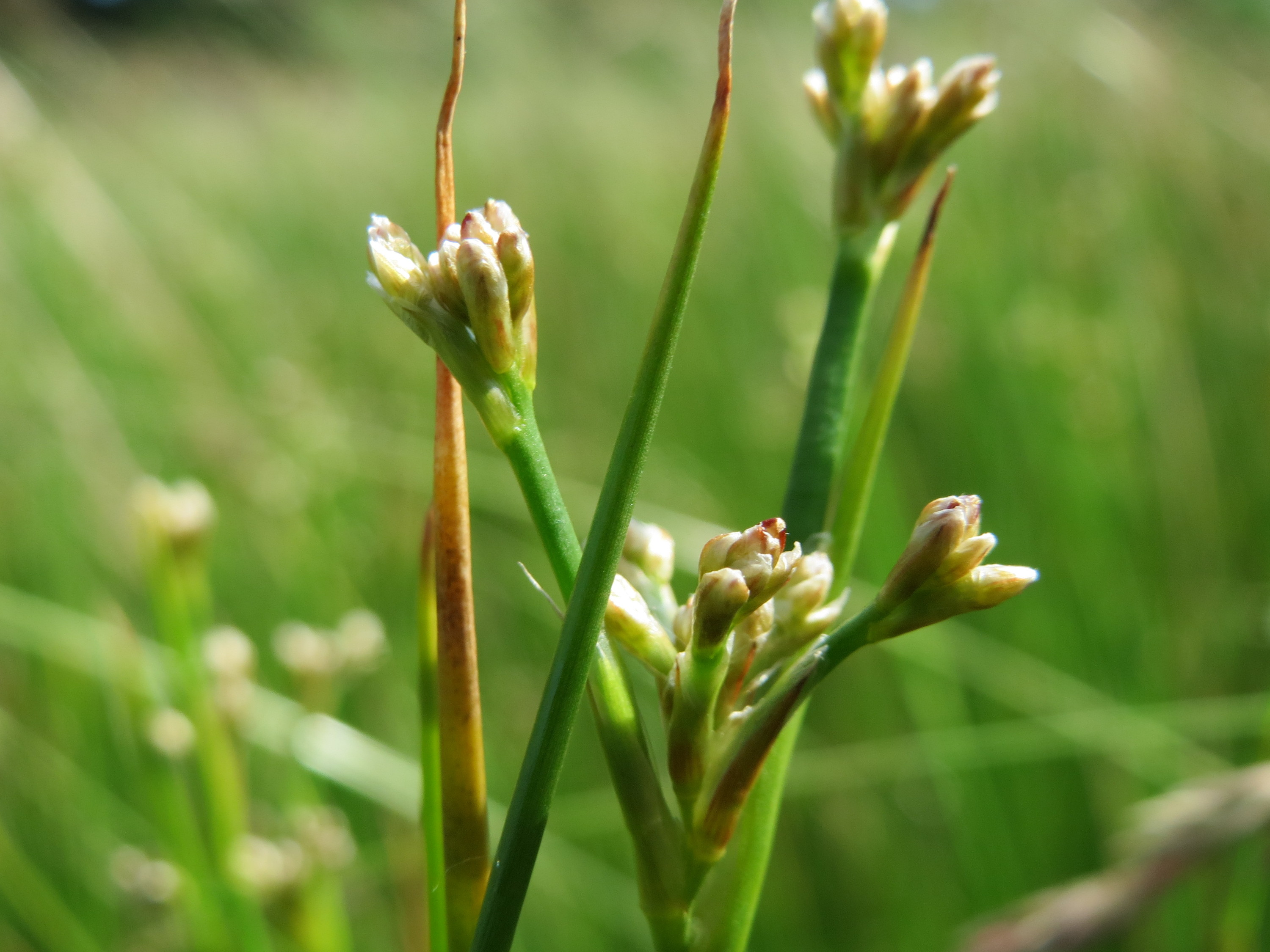 Spitzblütige Binse (Juncus acutiflorus) in den Horststückern im Landschaftsschutzgebiet Hockenheimer Rheinbogen